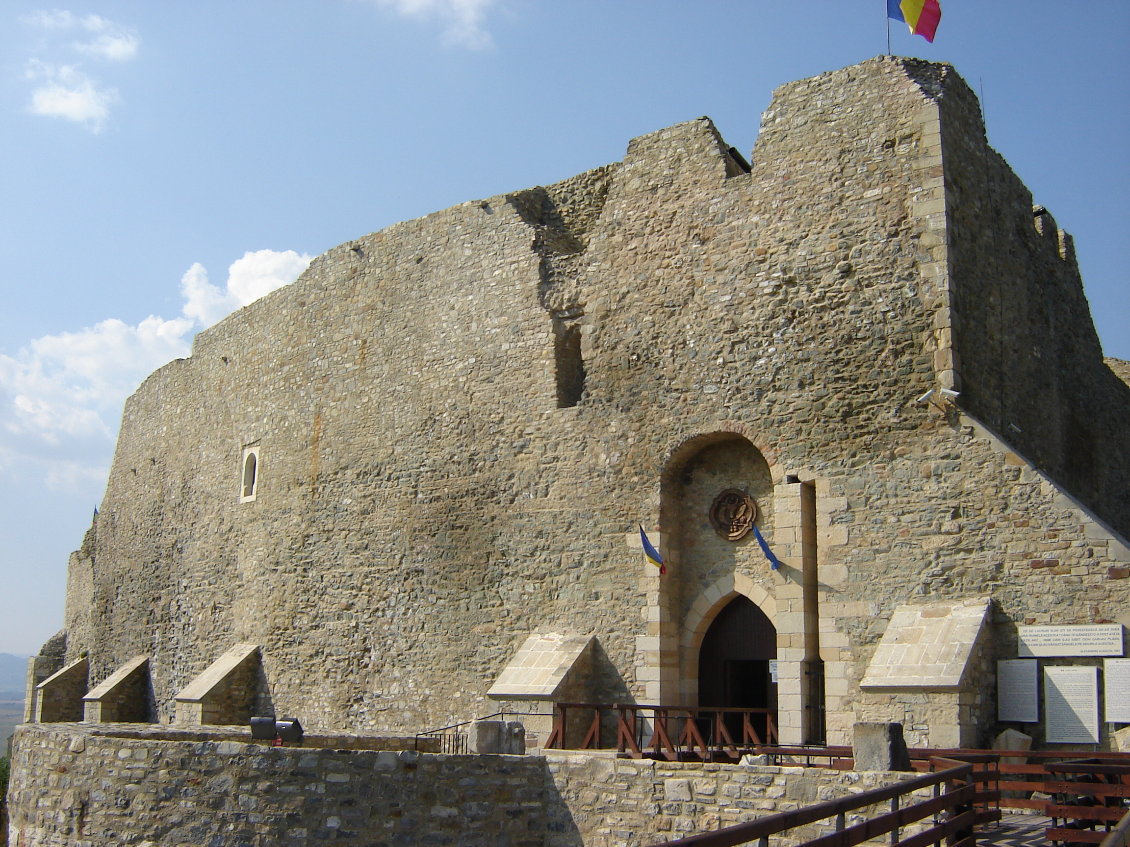 Cetatea Neamtului